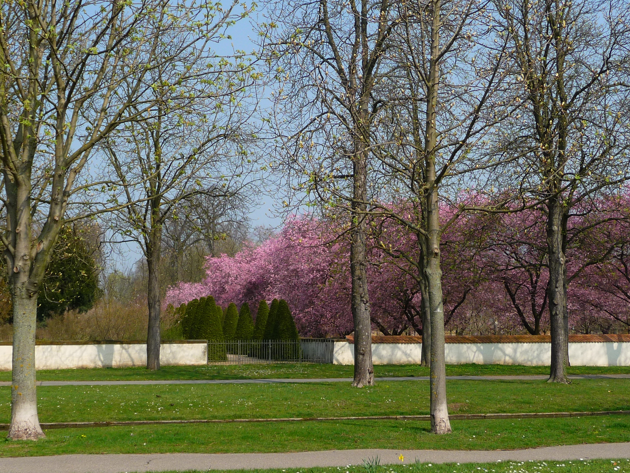 Kirschblüte im Schwetzinger Schlossgarten (Baden-Württemberg, Deutschland)